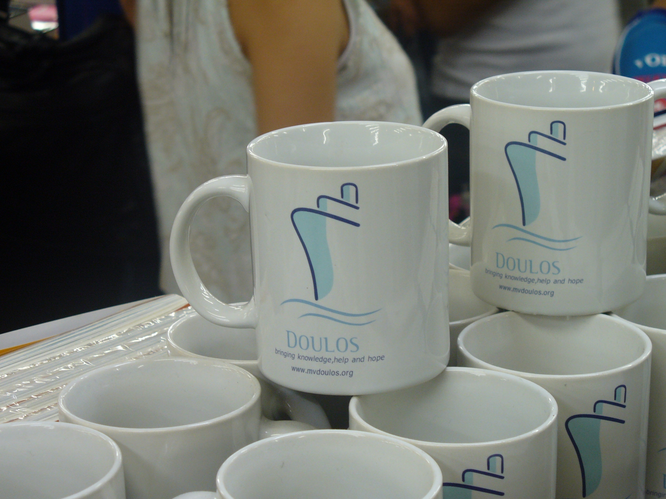 MV Doulos